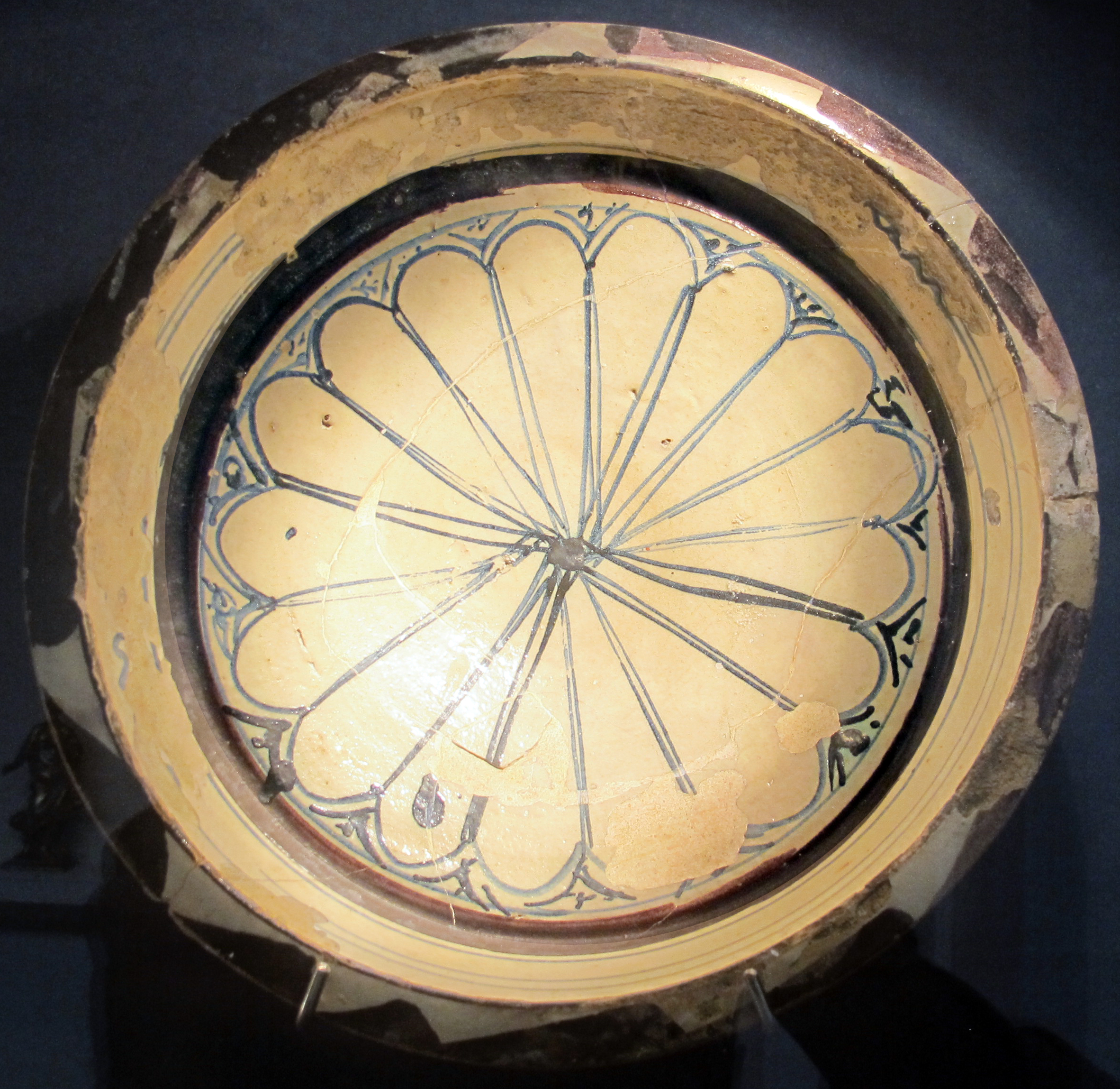 Museo diocesano (San Miniato)